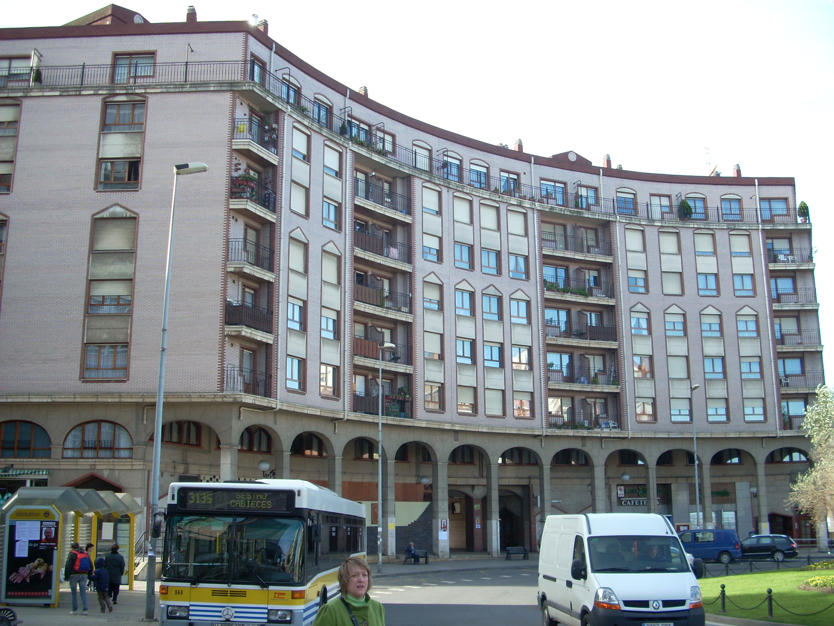 Kabiezeseko Plaza, San Jorge hotela eta Bizkaibus geltokiarekin / Plaza de Kabiezes, Hotel San Jorge y estación de autobuses.